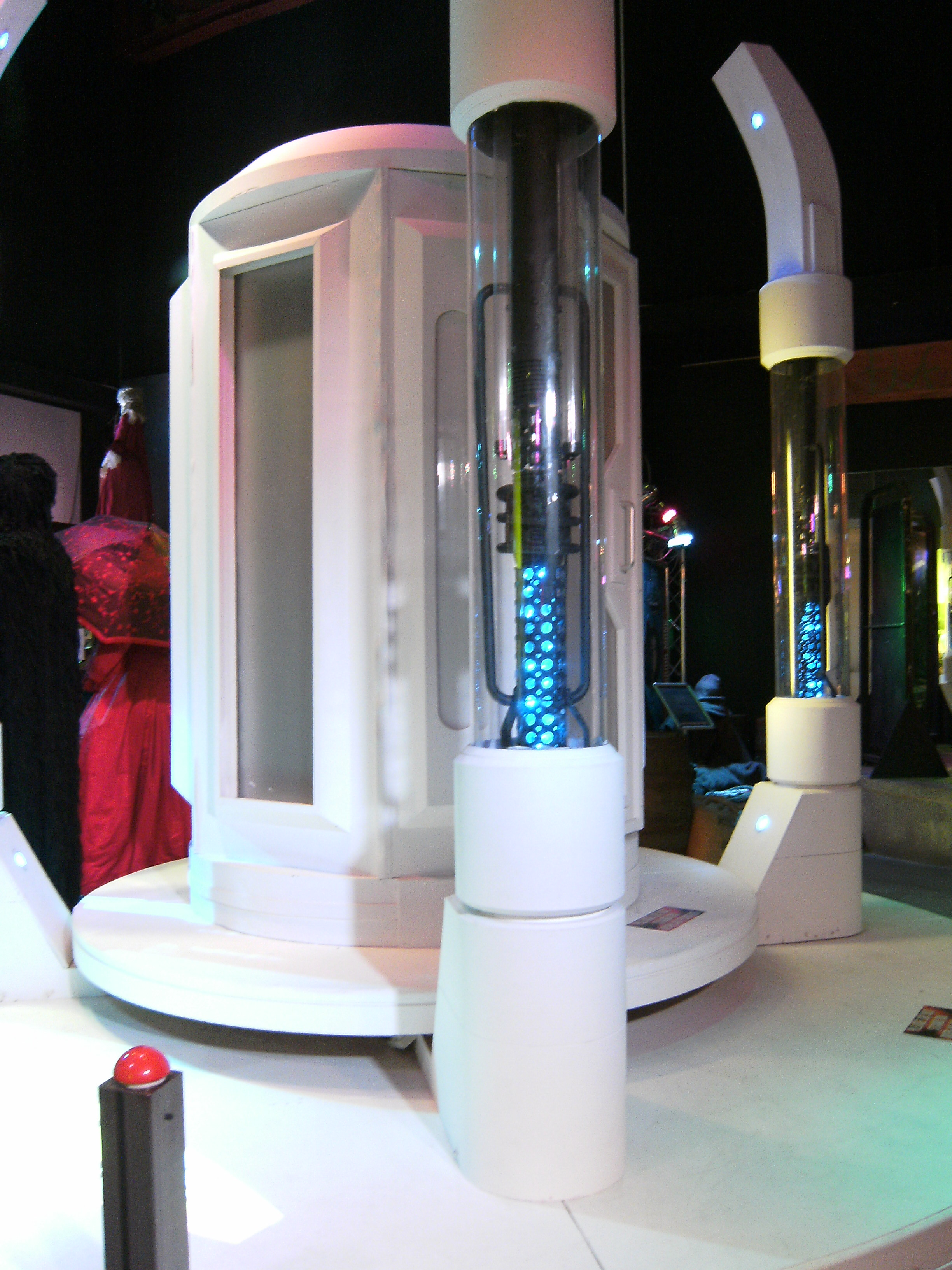 Rollei Doctor Who Experience